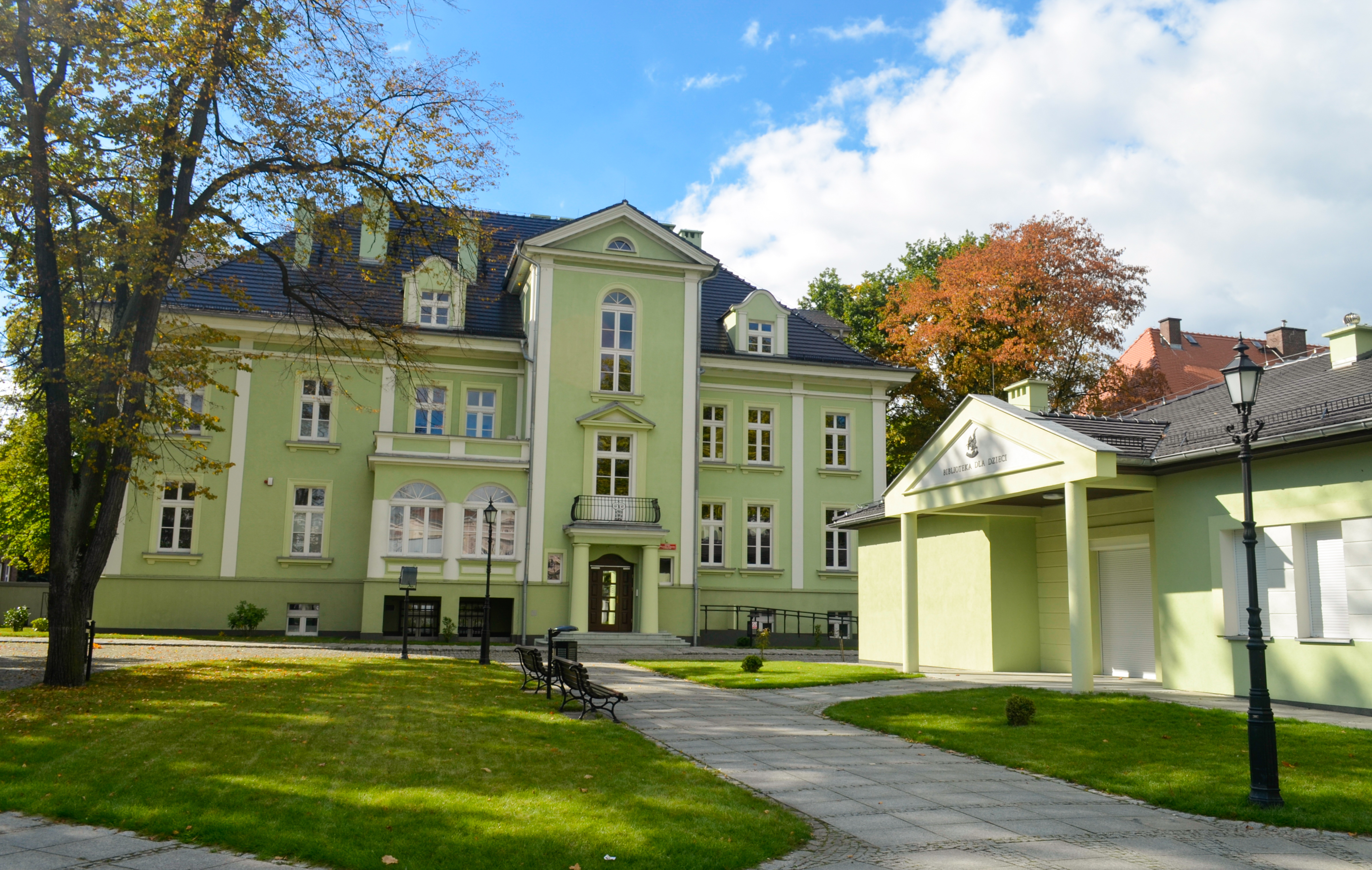 Nowa Sól, willa Karla Jansona, ob. budynek użyteczności publicznej, po 1920